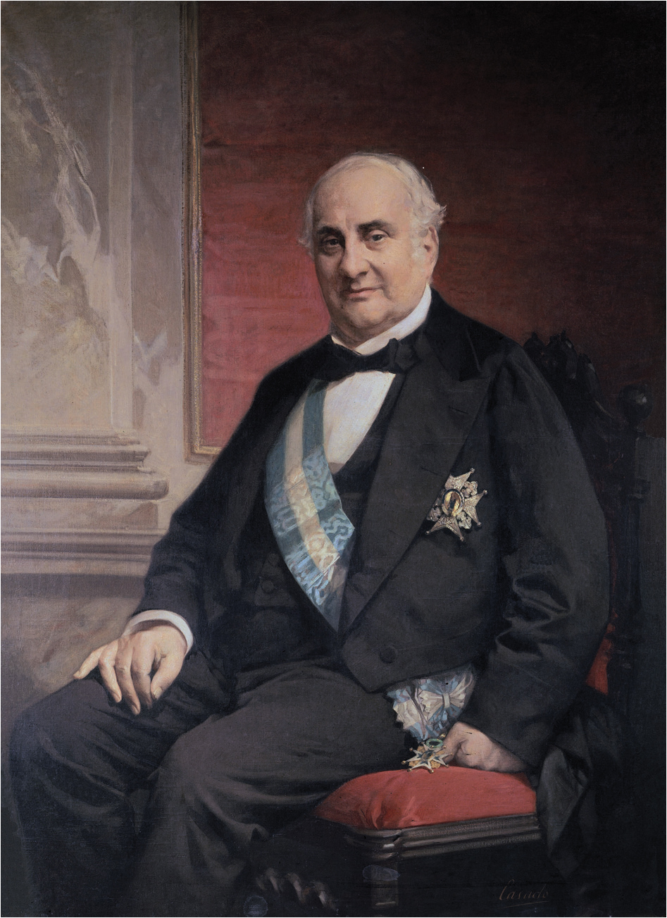 Retrato del politico español Alejandro Mon y Menéndez (1881-1882), que llegó a ser ministro de Hacienda y presidente del Consejo de Ministros durante el reinado de Isabel II de España.